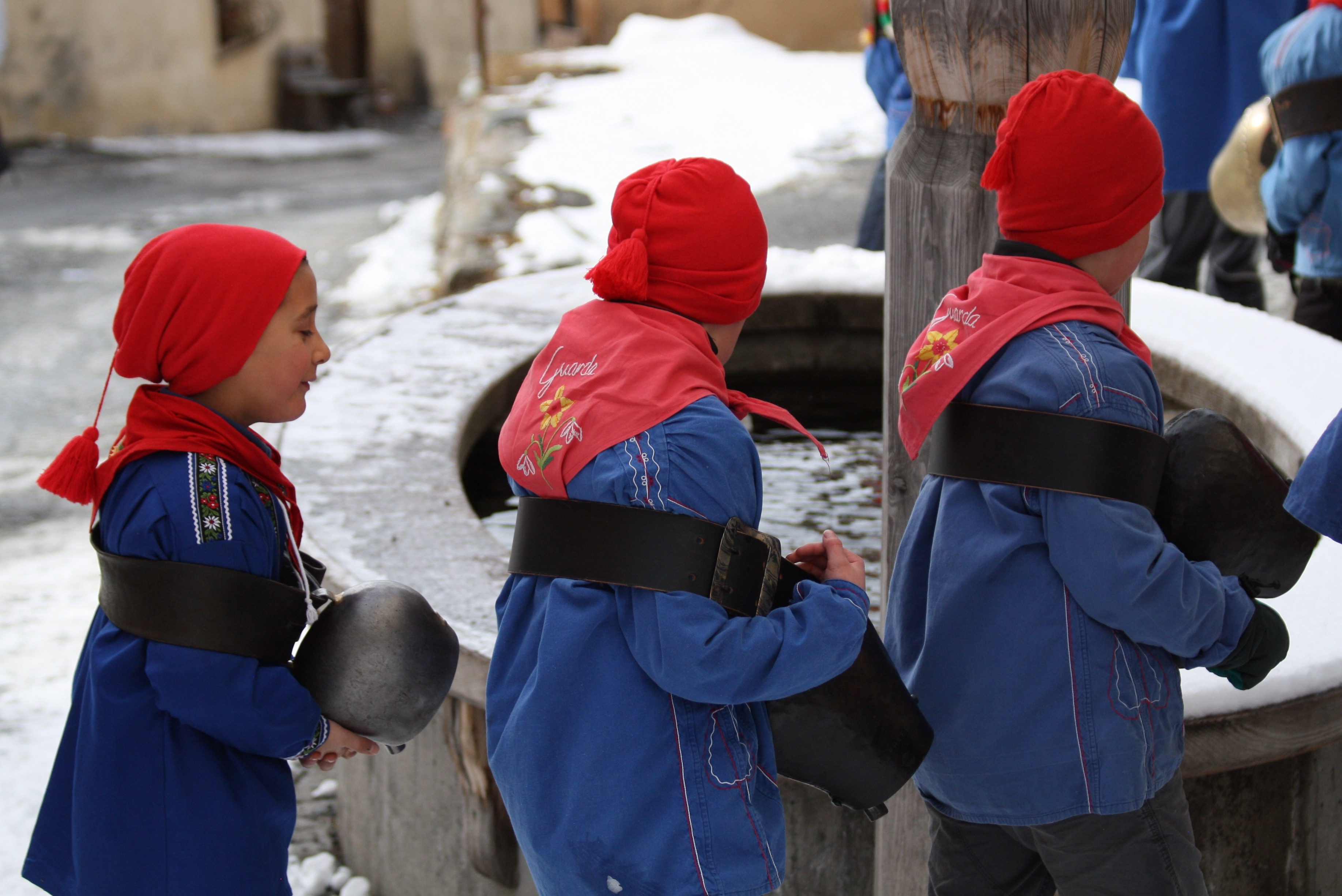 Chalandamarz Guarda 2017